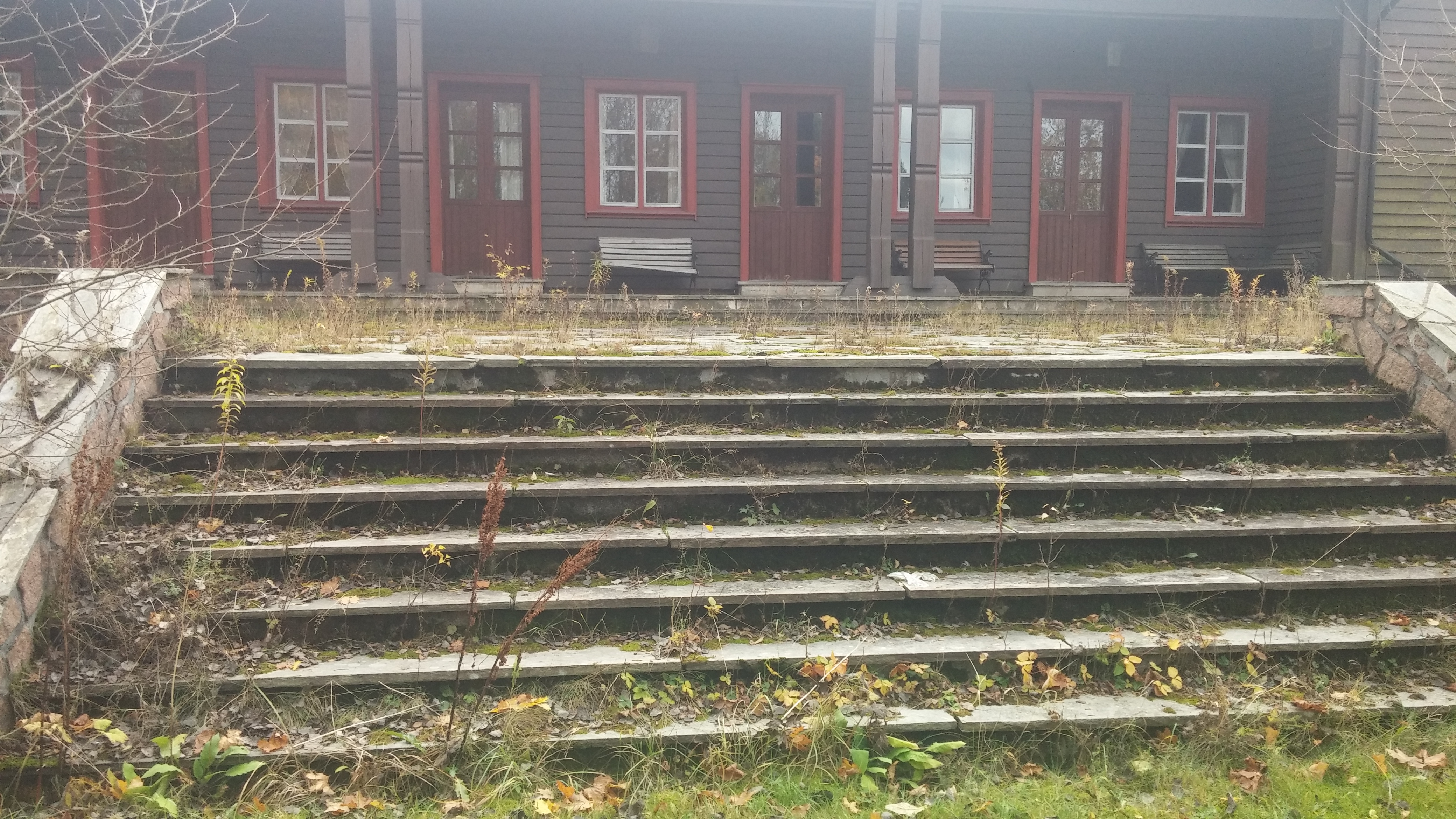 Offisersmessen Casino i Grefsrudleiren ved Holmestrand, bygget av tyskerne under andre verdenskrig, også benyttet til utdannelse av frontkjempere og hirdens vaktmannskaper til fangeleire